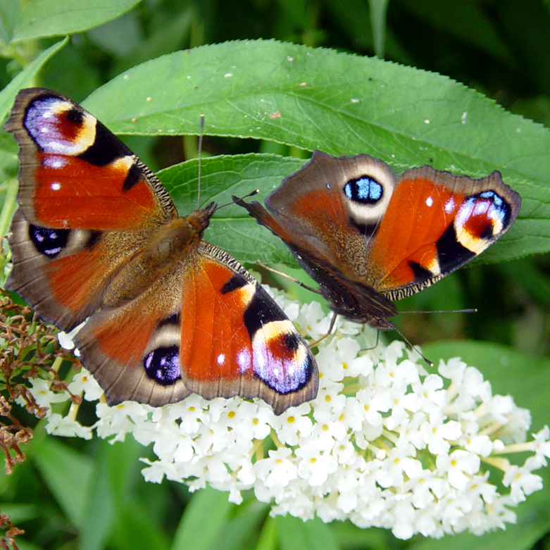 Tagpfauenaugen auf einem weißen Sommerflieder